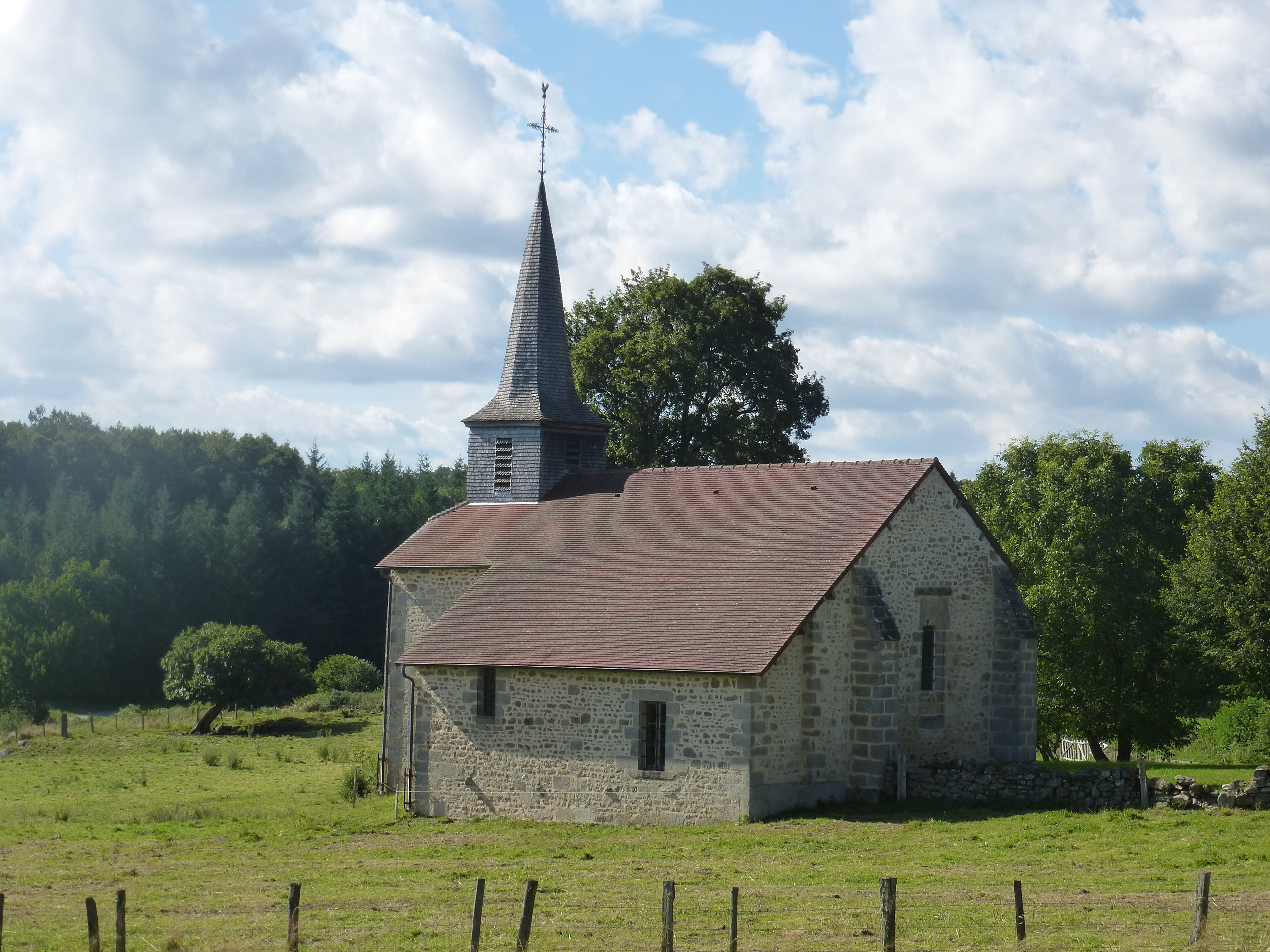 église